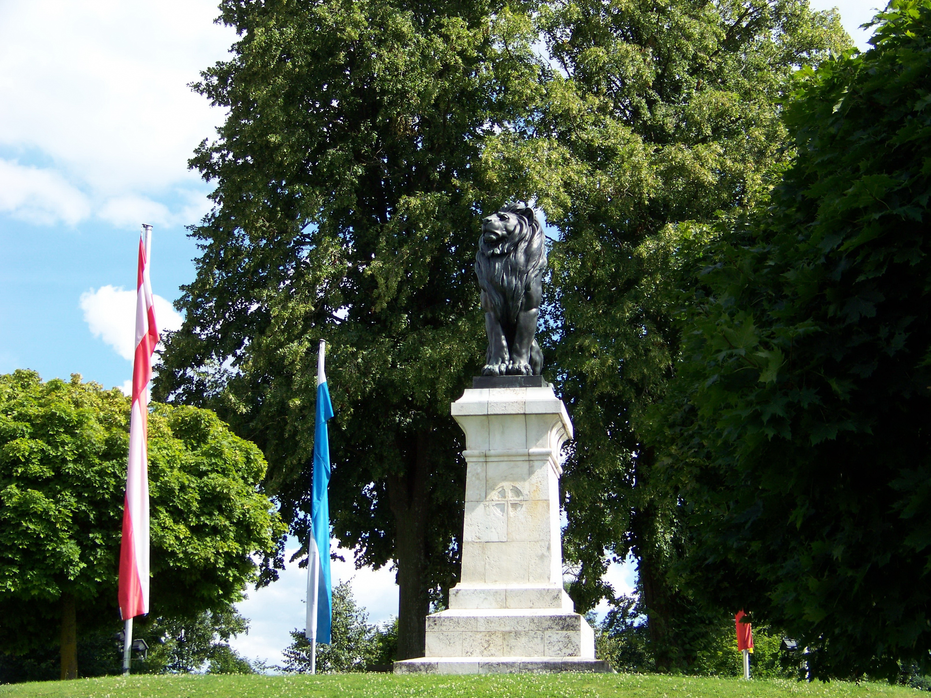 Am Löwendenkmal. Löwendenkmal um Andenken an die Schlacht vom 22. 4. 1809, auf Hügel stehender Pfeiler mit gestuftem Unterbau, sitzendem Löwen Inschriften und Wappen, Kalkstein und Bronze, Entwurf Ferdinand von Miller, 1909.